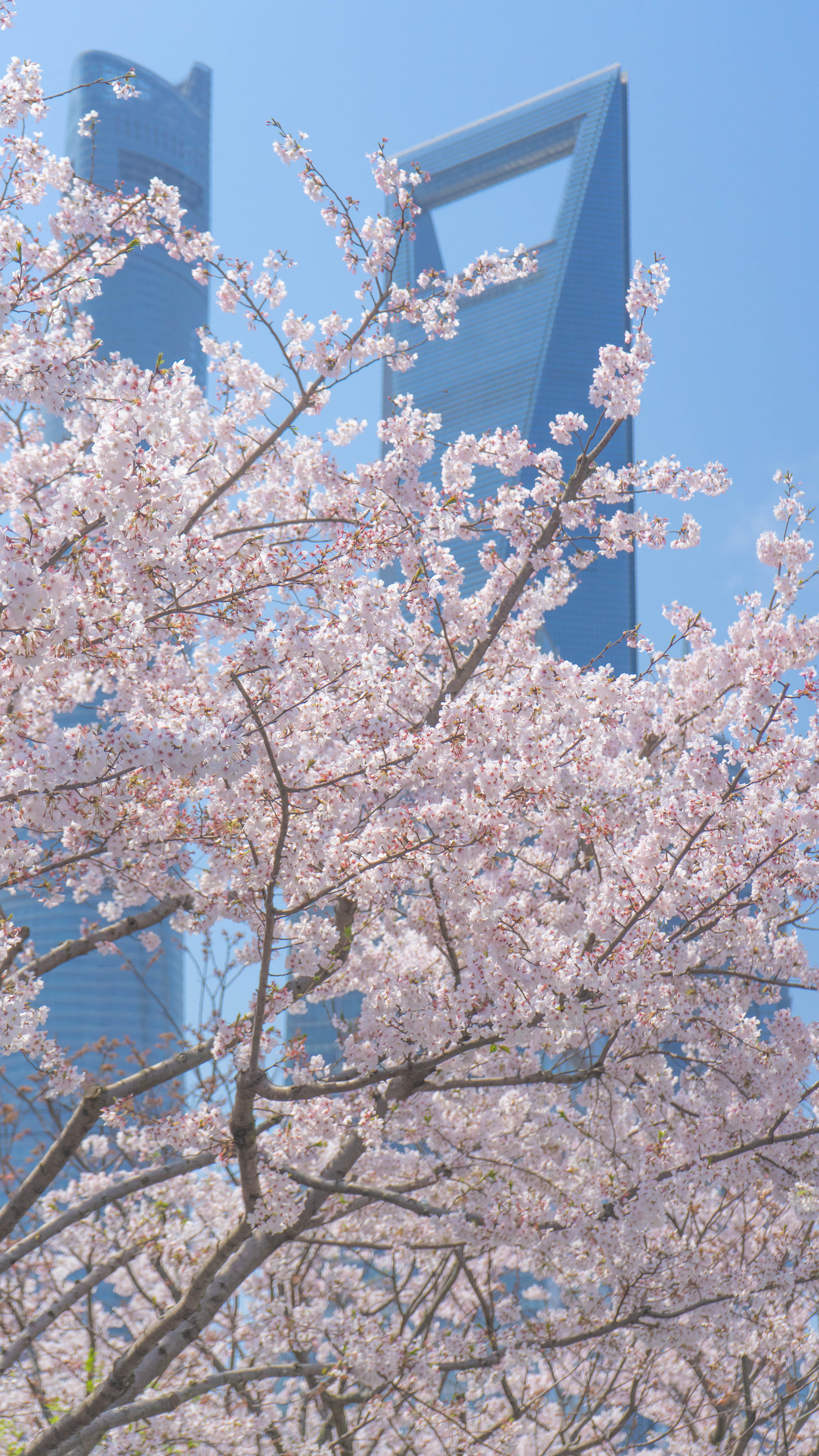 位于中国上海浦东新区东昌路地铁站外的樱花